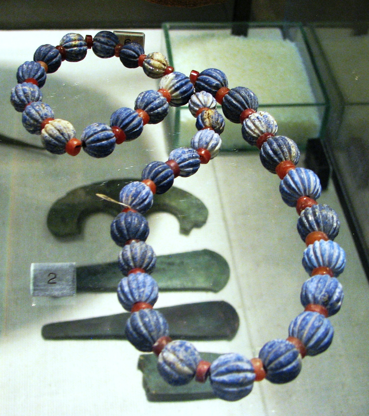 Intermediate Bronze Age Pottery in Hecht Museum כלים מתקופת הברונזה הביניימית במוזיאון הכט באוניברסיטת חיפה 2300-2000 לפני הספירה מחרוזת מלפיס לזולי ואגאט ממצא מקבר